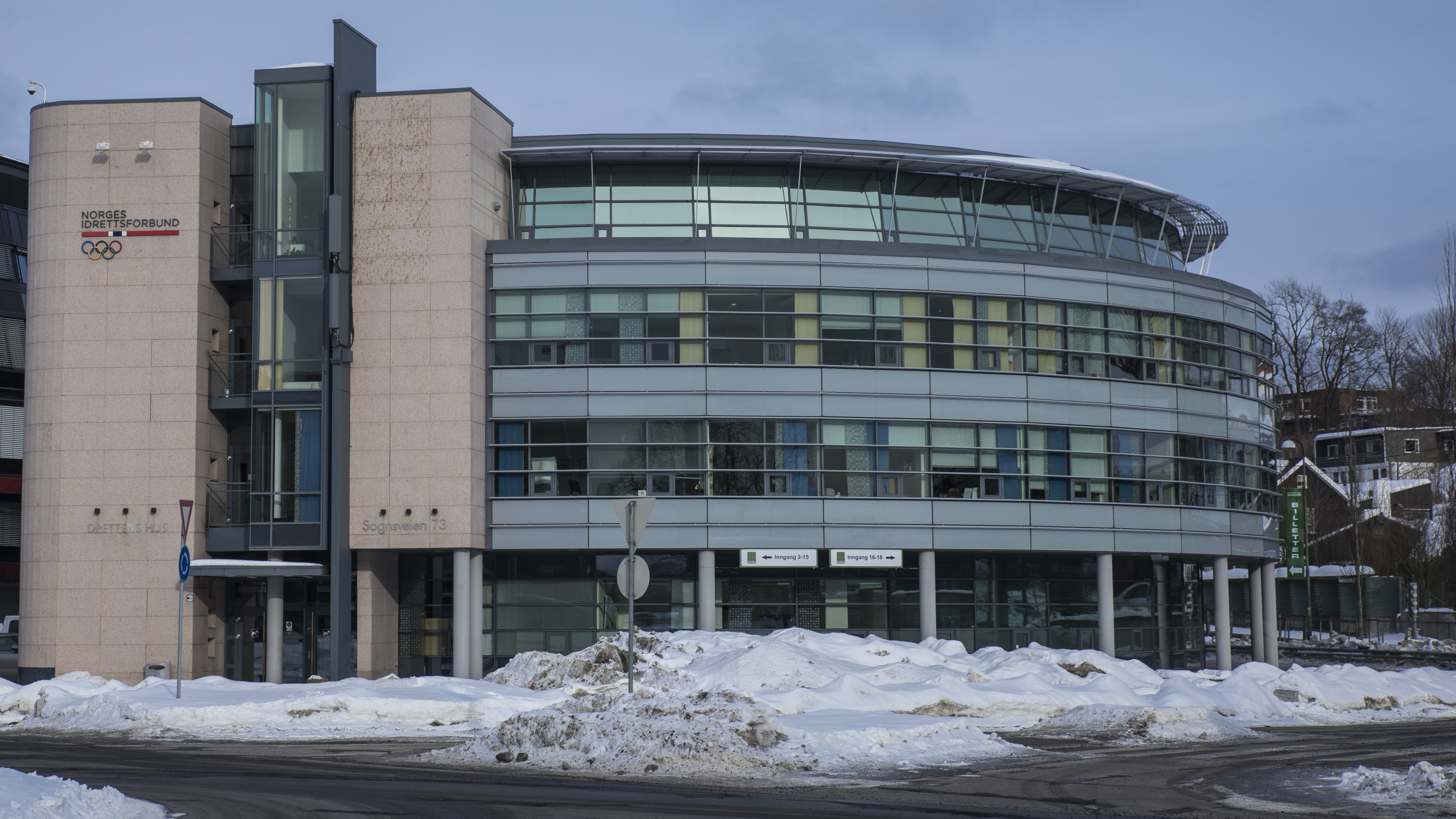 Administrasjonen til Norges idrettsforbund.